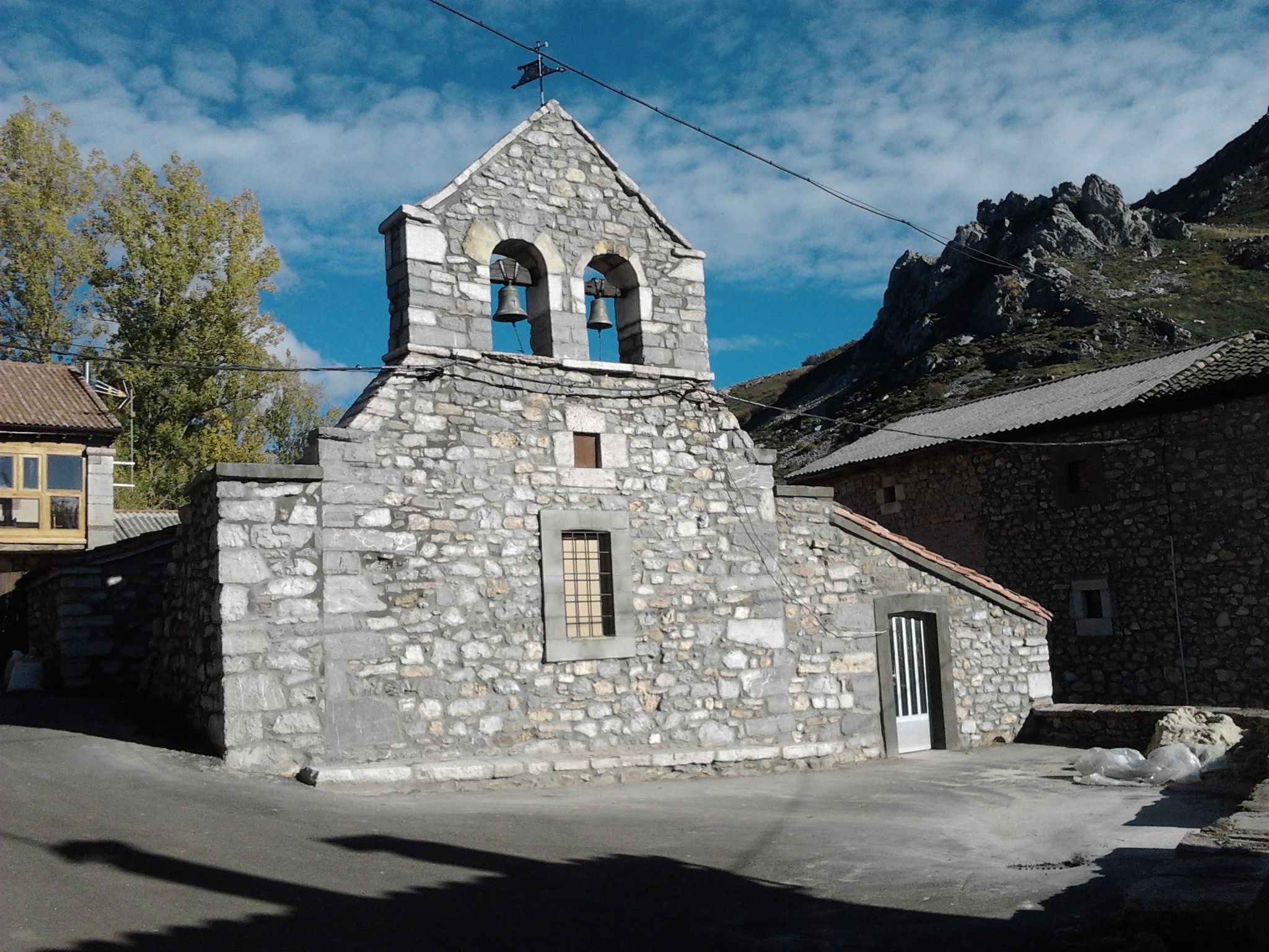 Iglesia después de la restauración